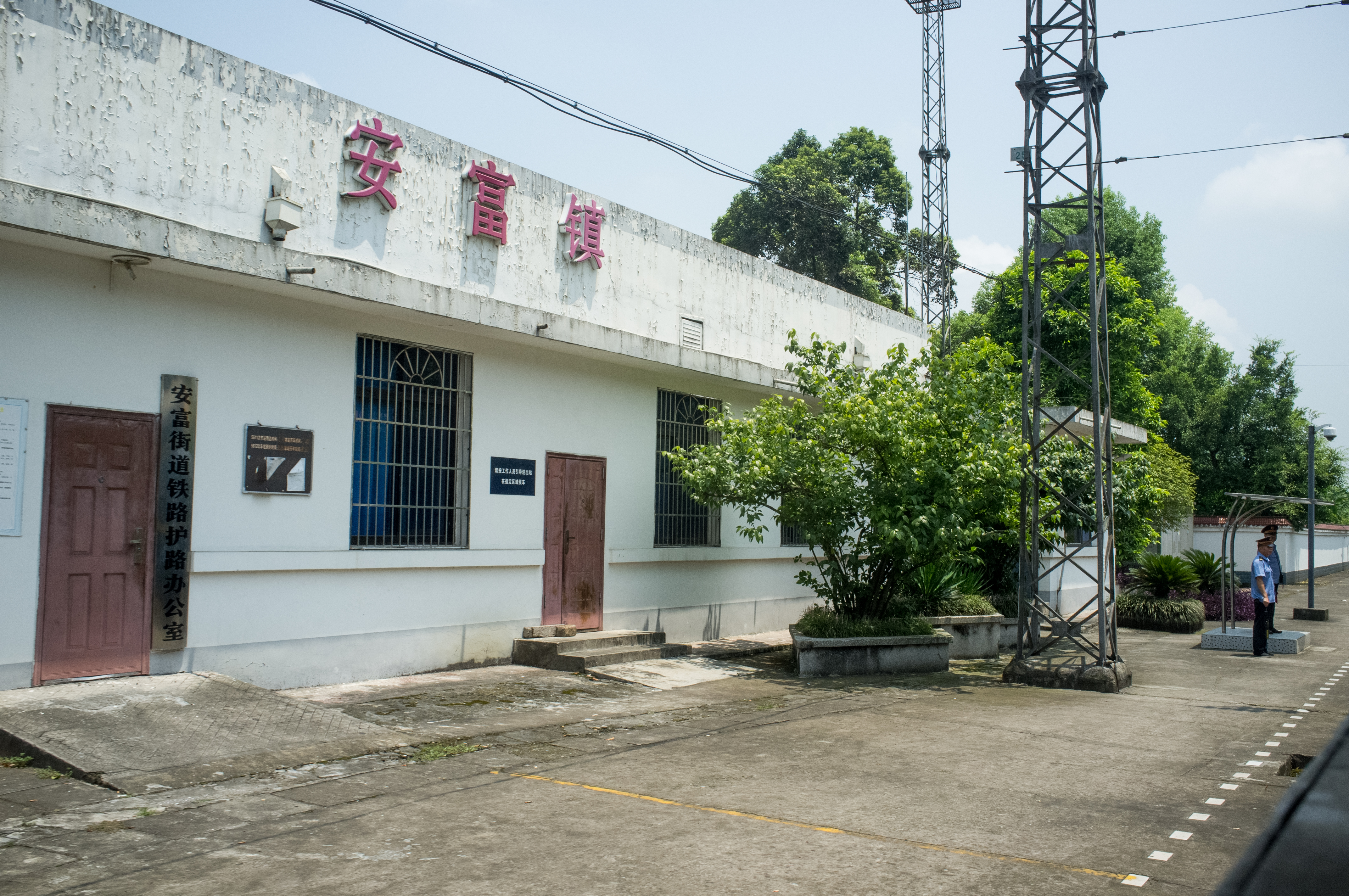 中文（中国大陆）: 成渝铁路安富镇站